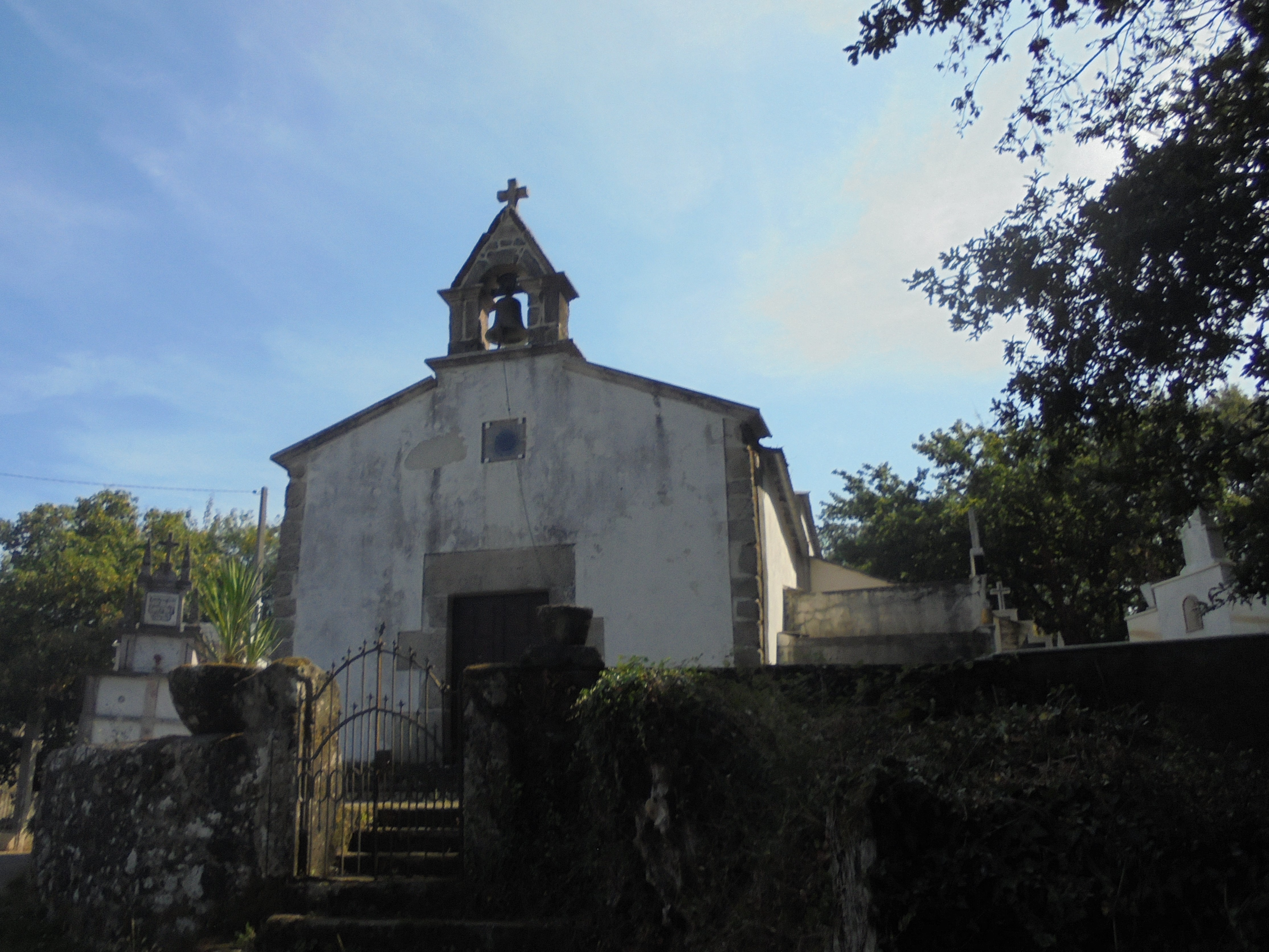 Igrexa parroquial de San Salvador de Larín